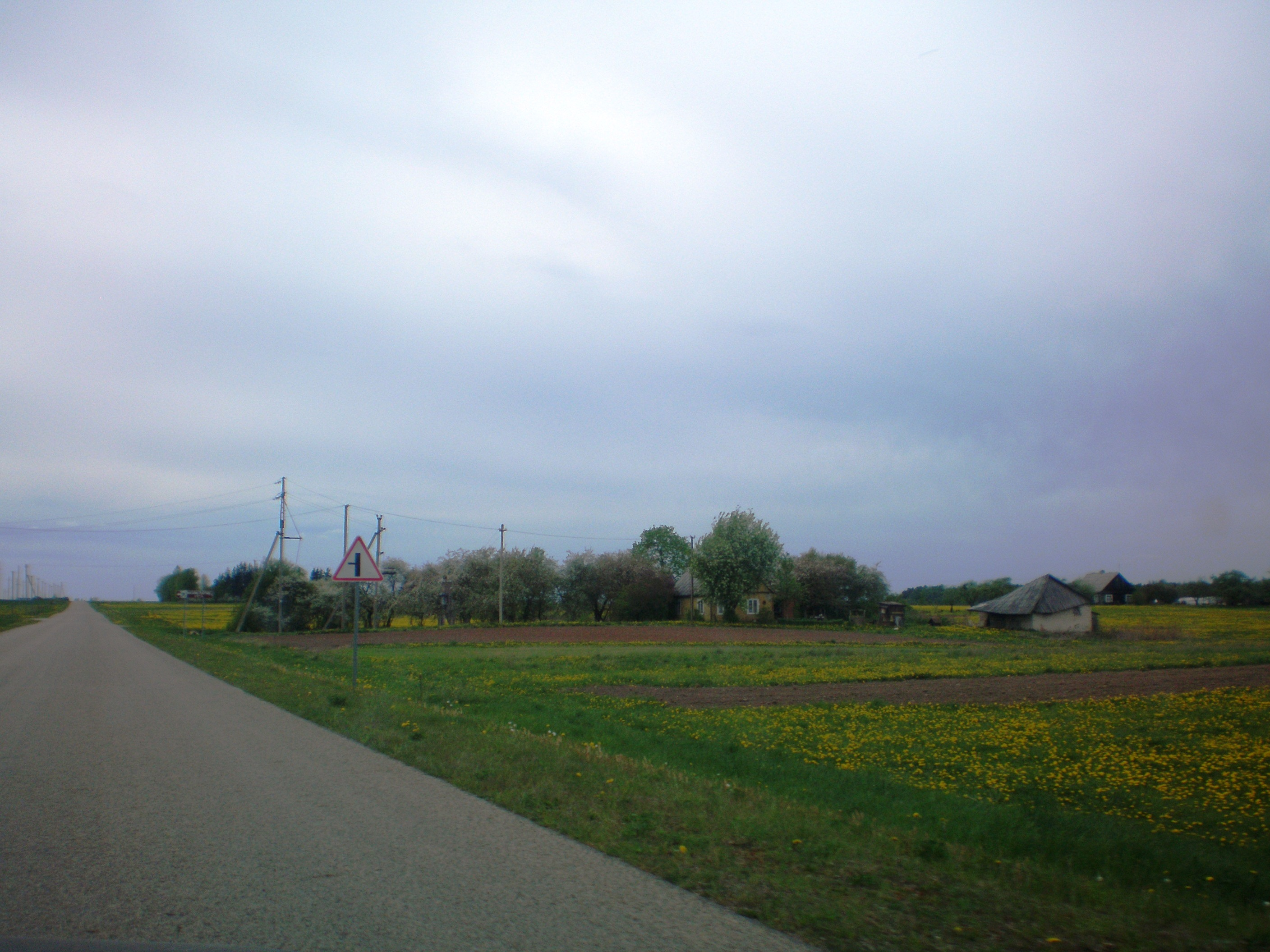 Peštiniukai, Krakių sen., Kėdainių raj.